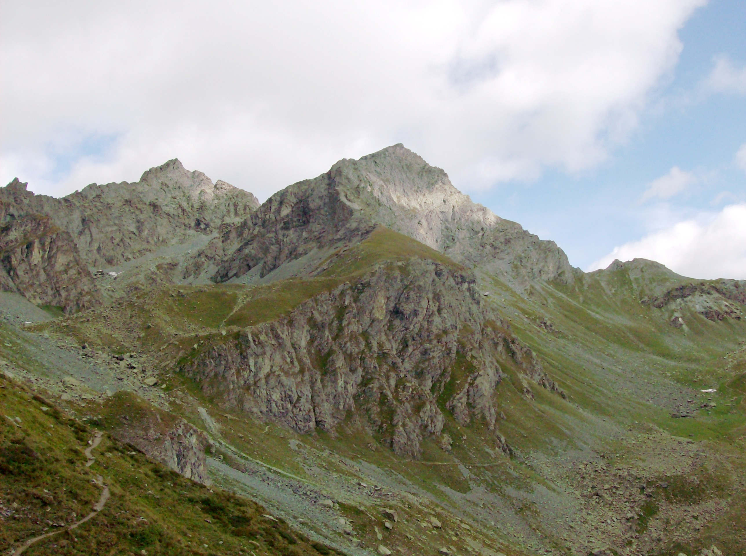 Il monte Meidassa visto da sud, dal sentiero del postino. A sinistra, il monte Granero; tra le due montagne, il canalone che conduce al passo Luisàs.